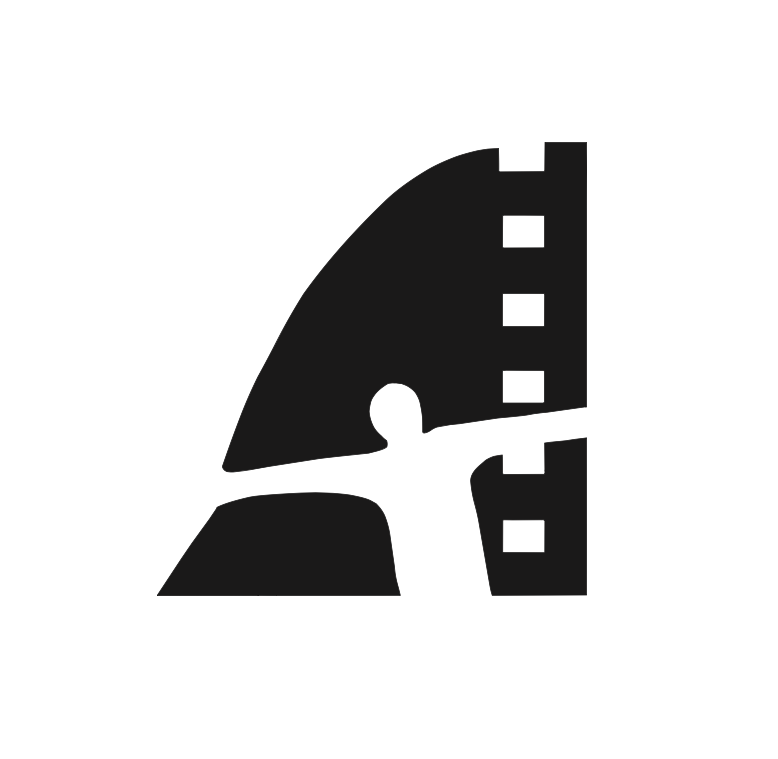 Международный правозащитный кинофестиваль СТАЛКЕР. 1997 г